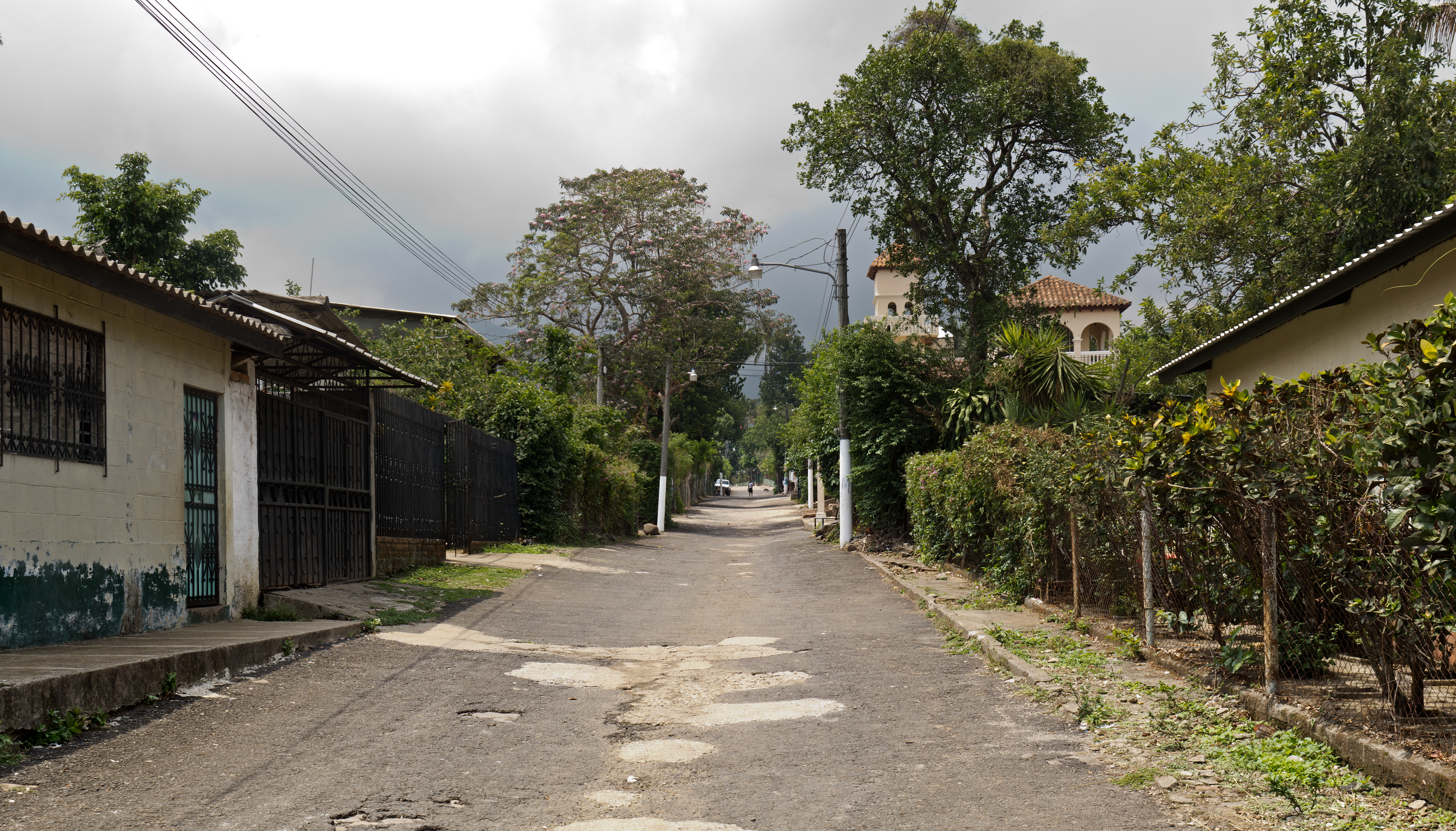 Street in Tamanique, La Libertad, El Salvador